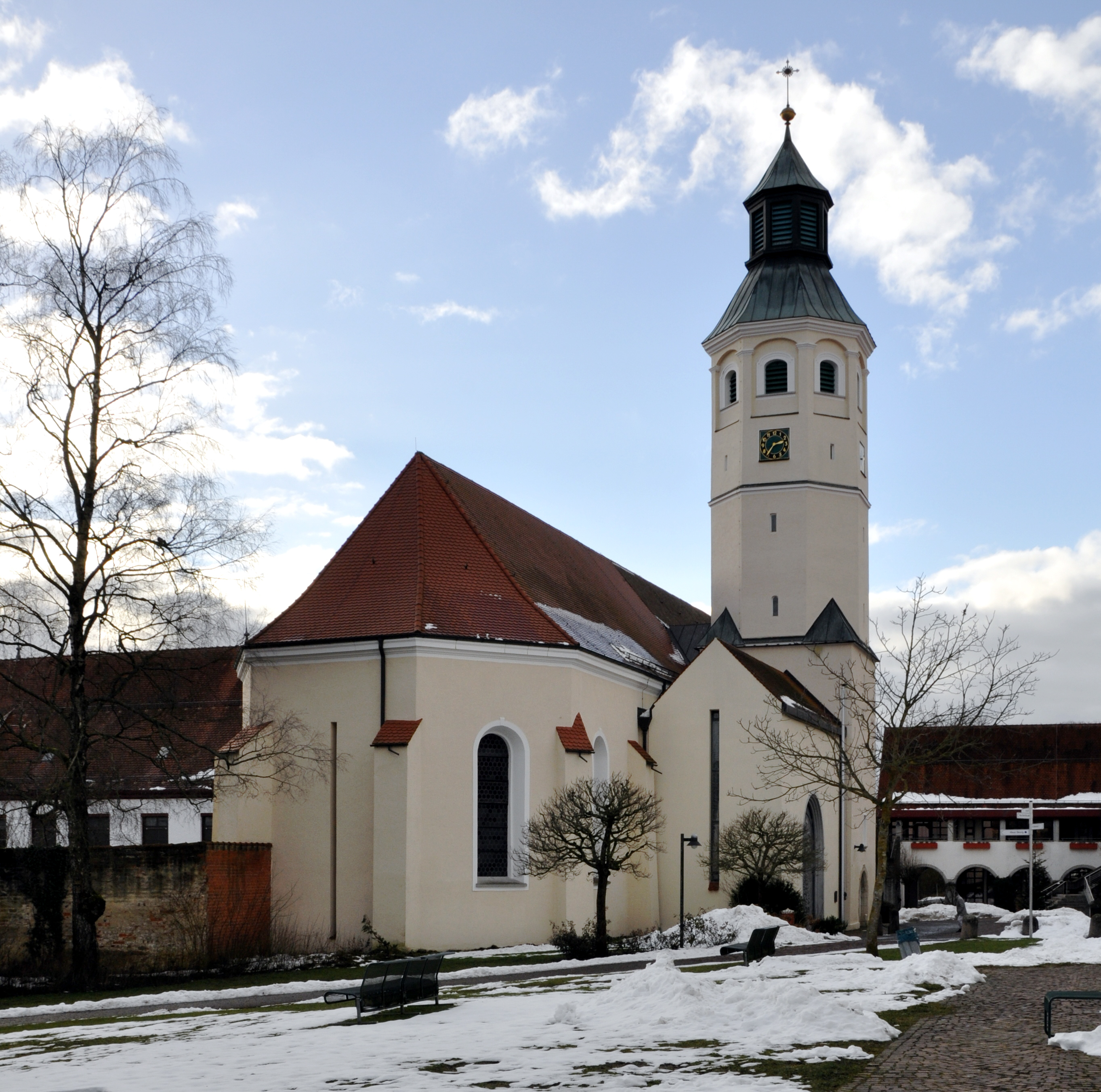 Ehemaliges Kloster Heggbach (Gemeinde Maselheim, Landkreis Biberach), heute Wohn- und Werkstattverbund ders Bereichs Behindertenhilfe der St. Elisabeth-Stiftung; Kirche St. Georg, Außenansicht